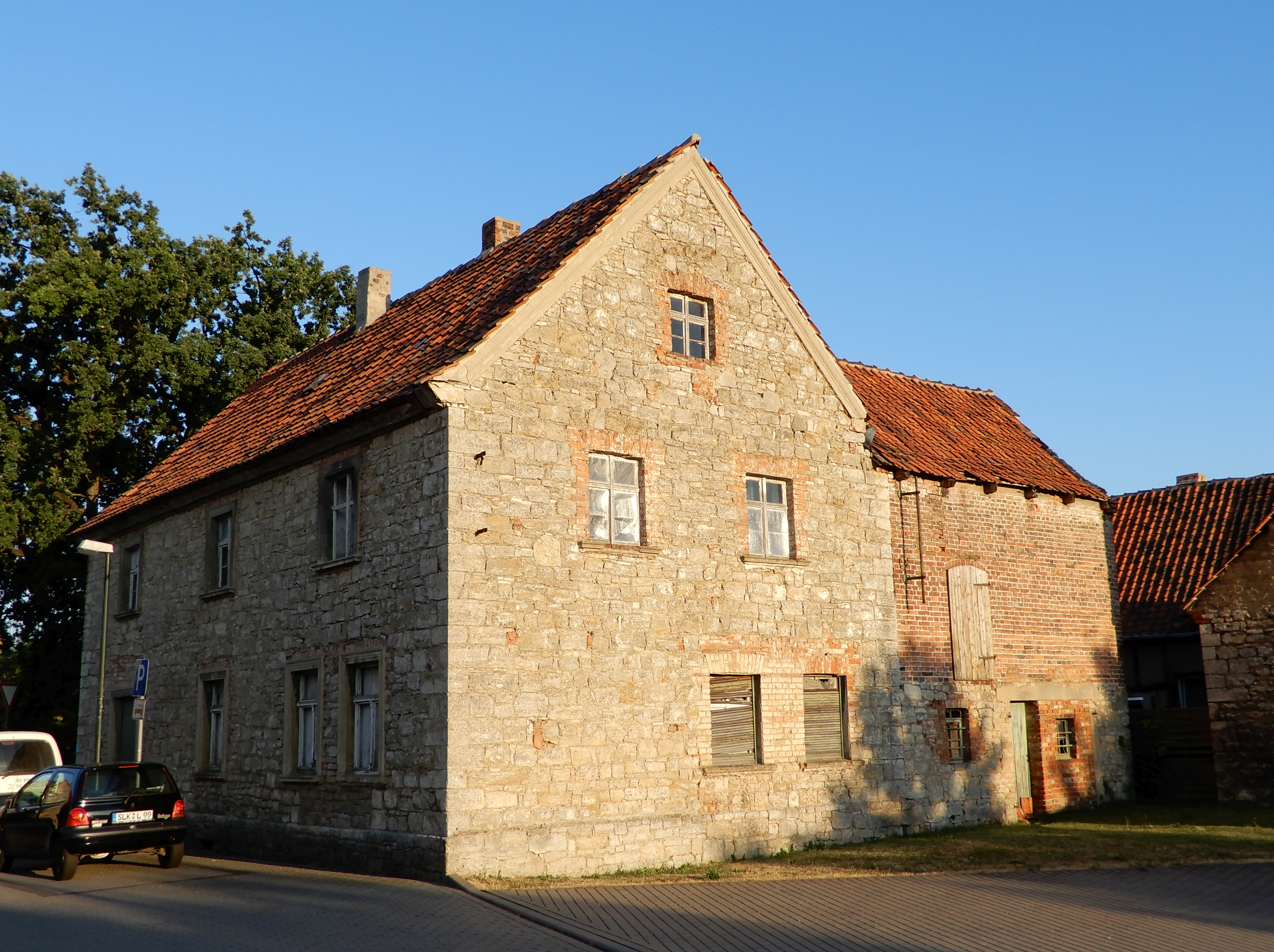 Gatersleben, Lange Straße 41